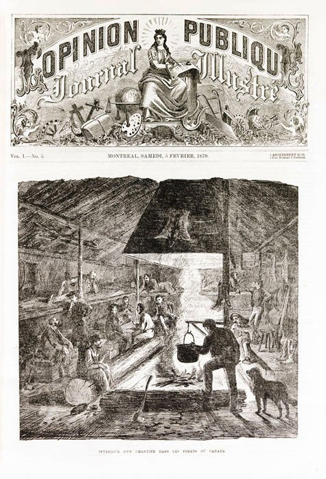 « Intérieur d'un chantier dans les forêts du Canada », L'Opinion Publique, Montréal (Québec), Vol. I, No. 8, 5 février 1870, p. 33, page entière comprenant l'entête et l'image Source: L'Opinion publique Montréal : G.E. Desbarats & Cie., [1870-1883]. -- Vol. 1, no 5 (5 février 1870). -- ISSN 0711-7477. -- P. 33